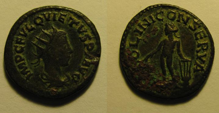 Antoninien de billon, diamètre 20 mm : face : Quietus (260-261) usurpateur en Syrie. Revers APOLLONI CONSERVA Apollon nu debout à gauche appuyé sur une lyre. Ref COHEN 3